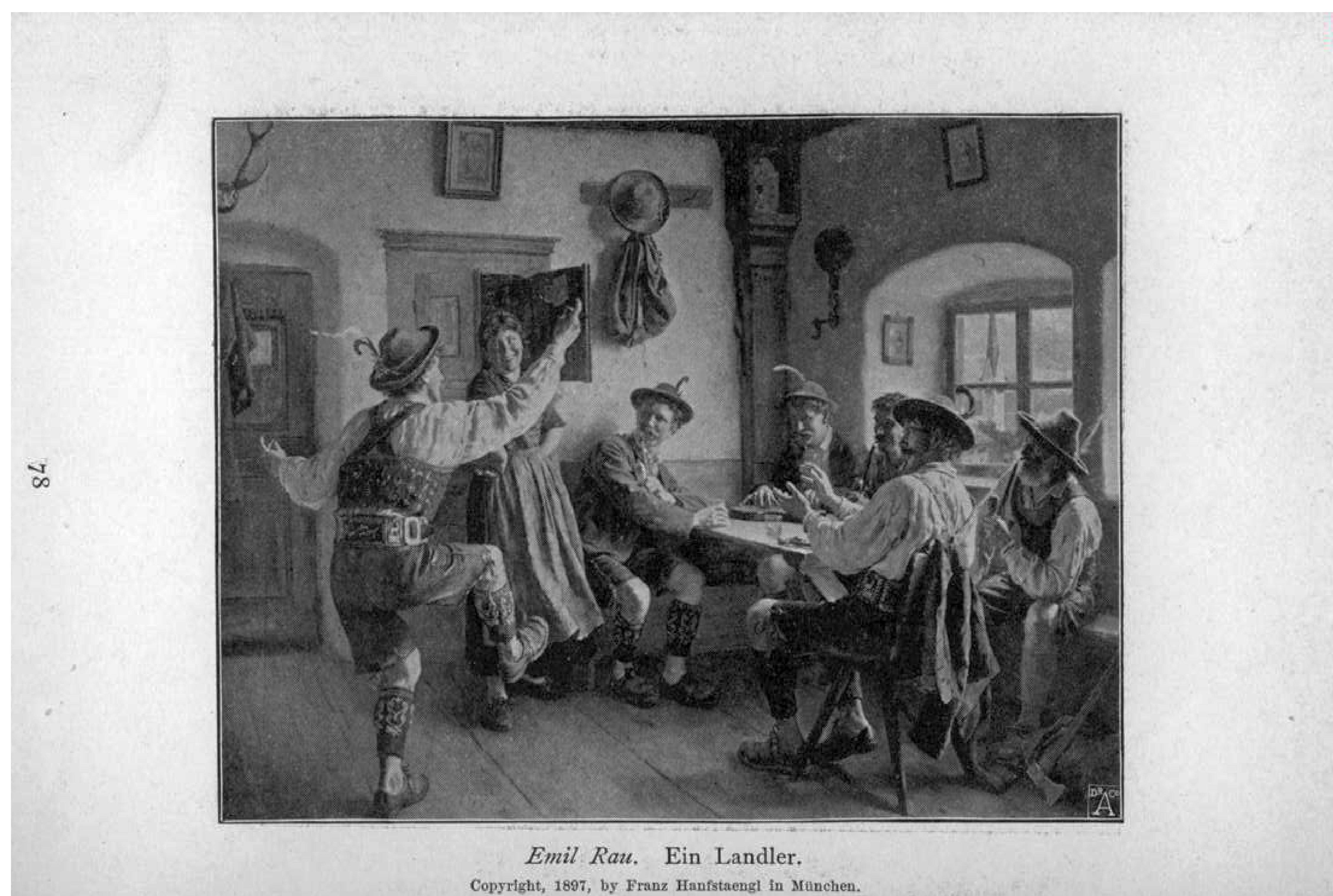 Ein Landler